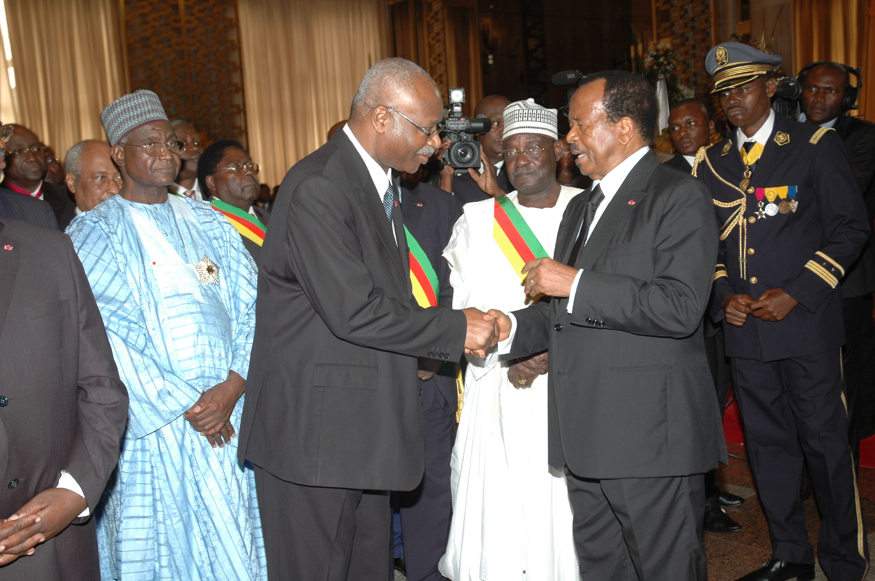 Entretien du Président Paul avec le premier ministre Philemon Yang, pendant la cérémonie de présentation des voeux